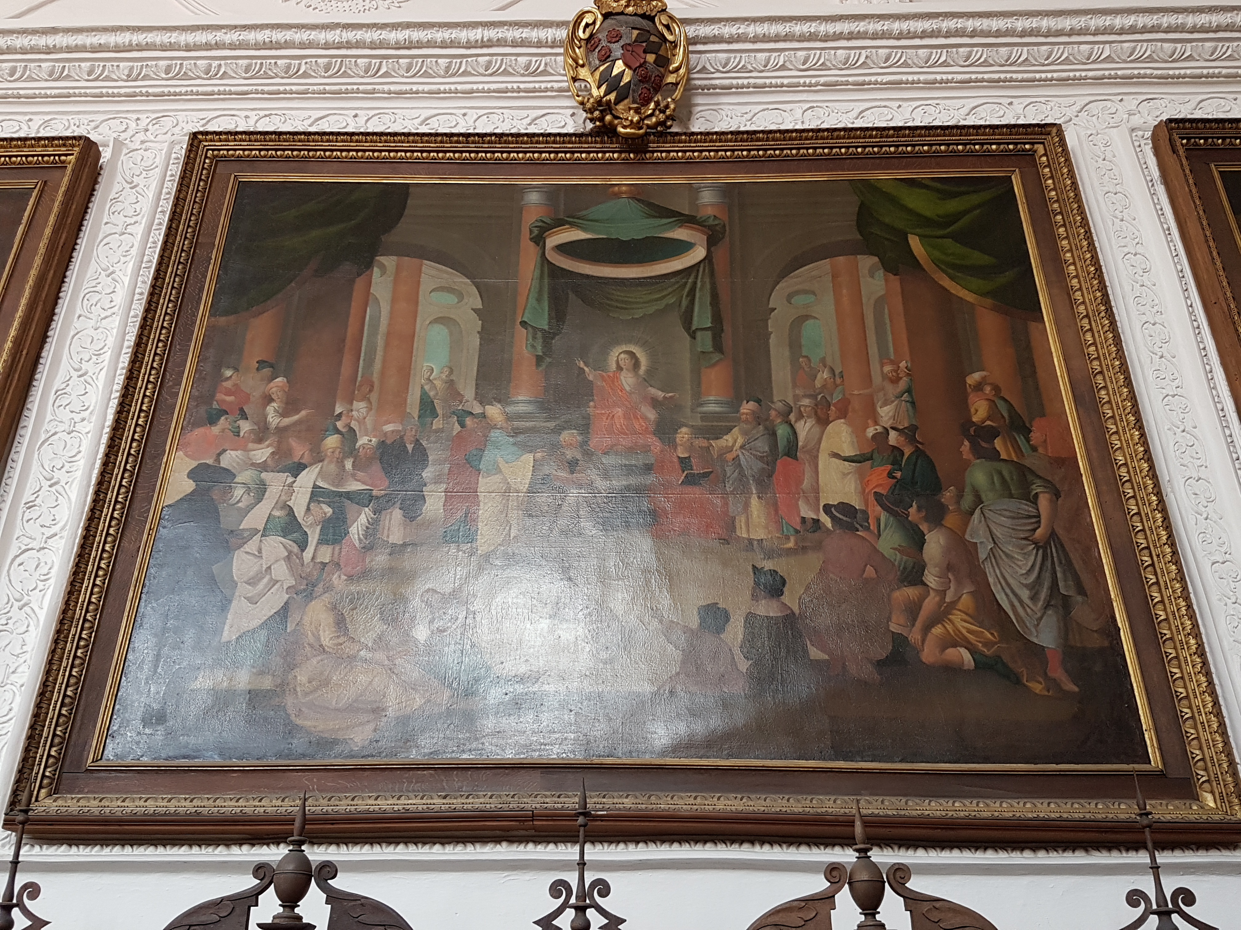 St. Vitus (Regensburg), Gemälde des Jesuszyklus